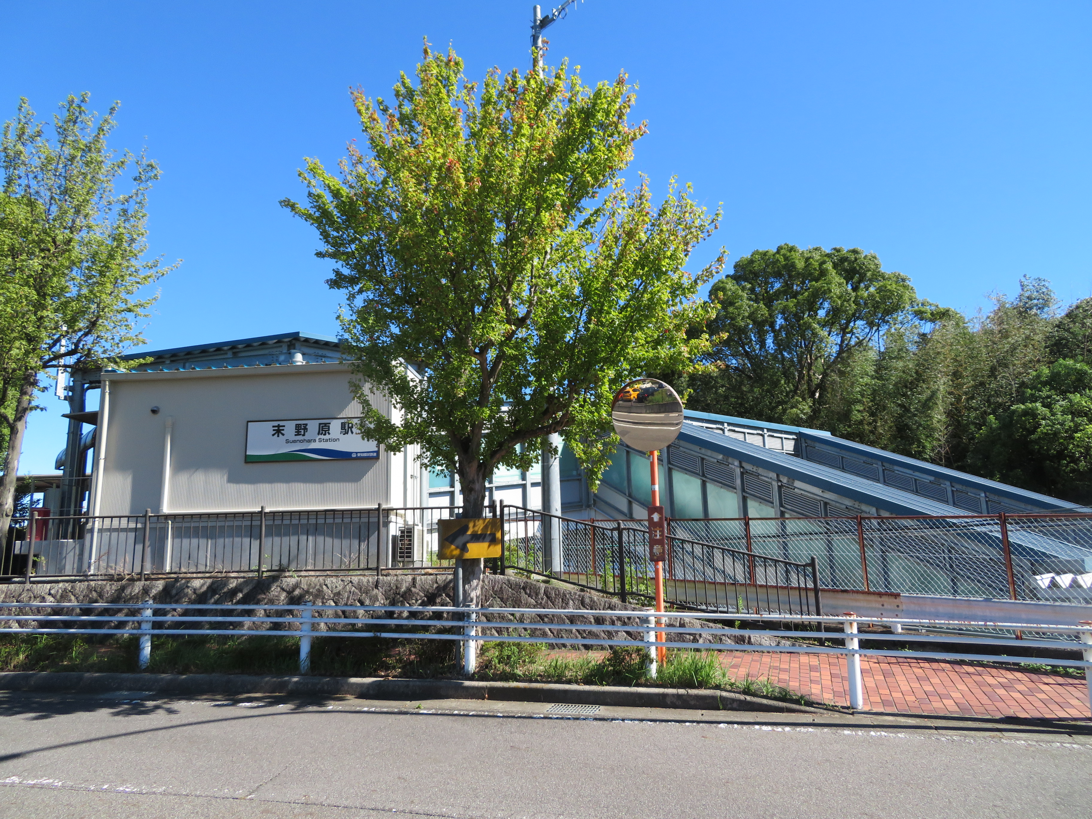 愛知環状鉄道線の末野原駅